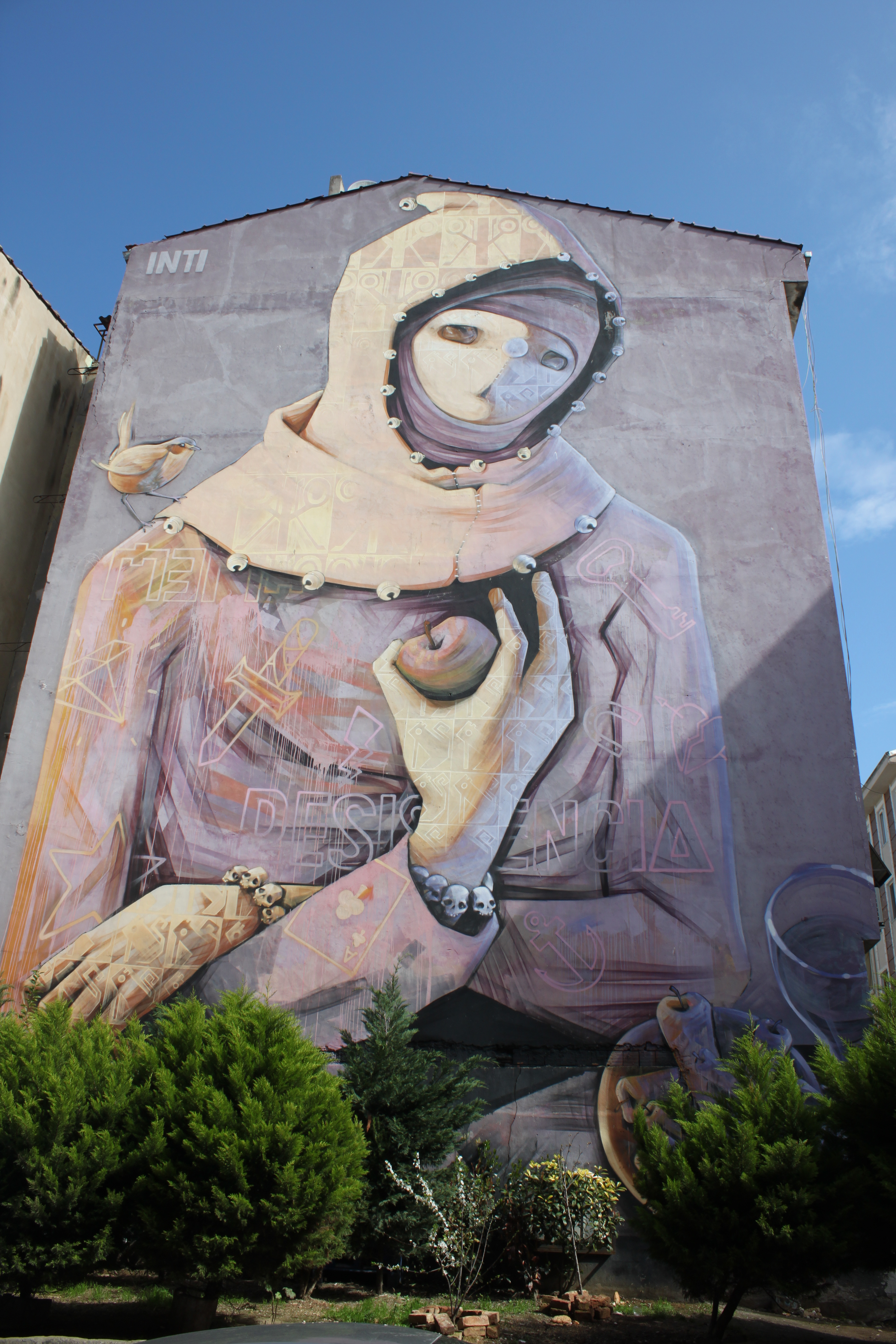 Yeldeğirmeni Taşlıbayır Sokak'ta bir mural. Inti imzalı.